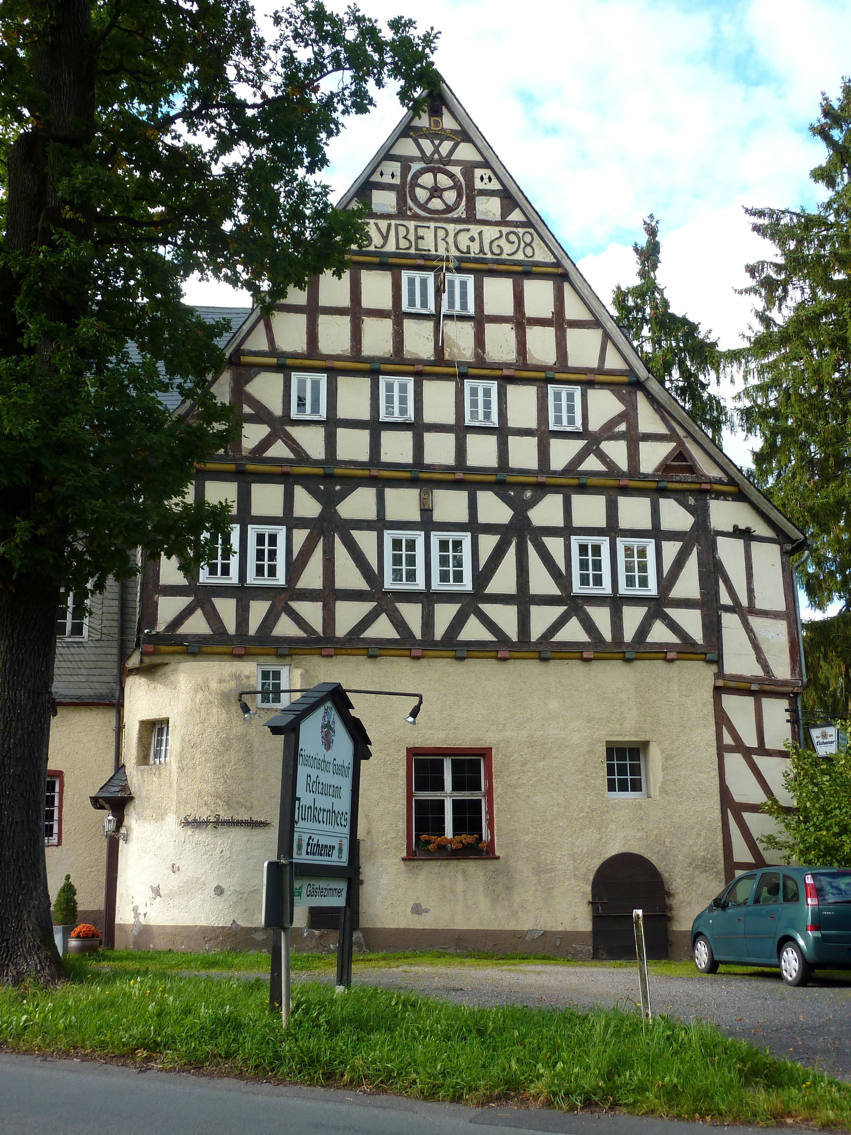 Kreuztal (Kreis Siegen-Wittgenstein/Westfalen), Ortsteil Junkernhees: Das im Jahr 1523 als Wasserschloss erbaute Schloss Junkernhees; Fachwerk an der Fassade des Haupthauses, mit Inschrift Syberg 1698 und Radsymbol am Giebel.